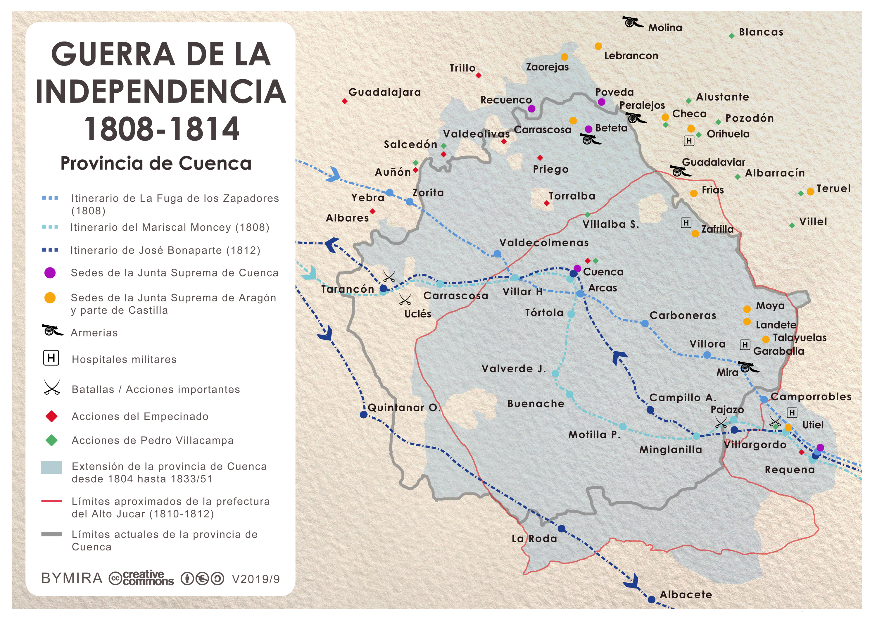 Mapa de la Guerra de la Independencia en la provincia de Cuenca